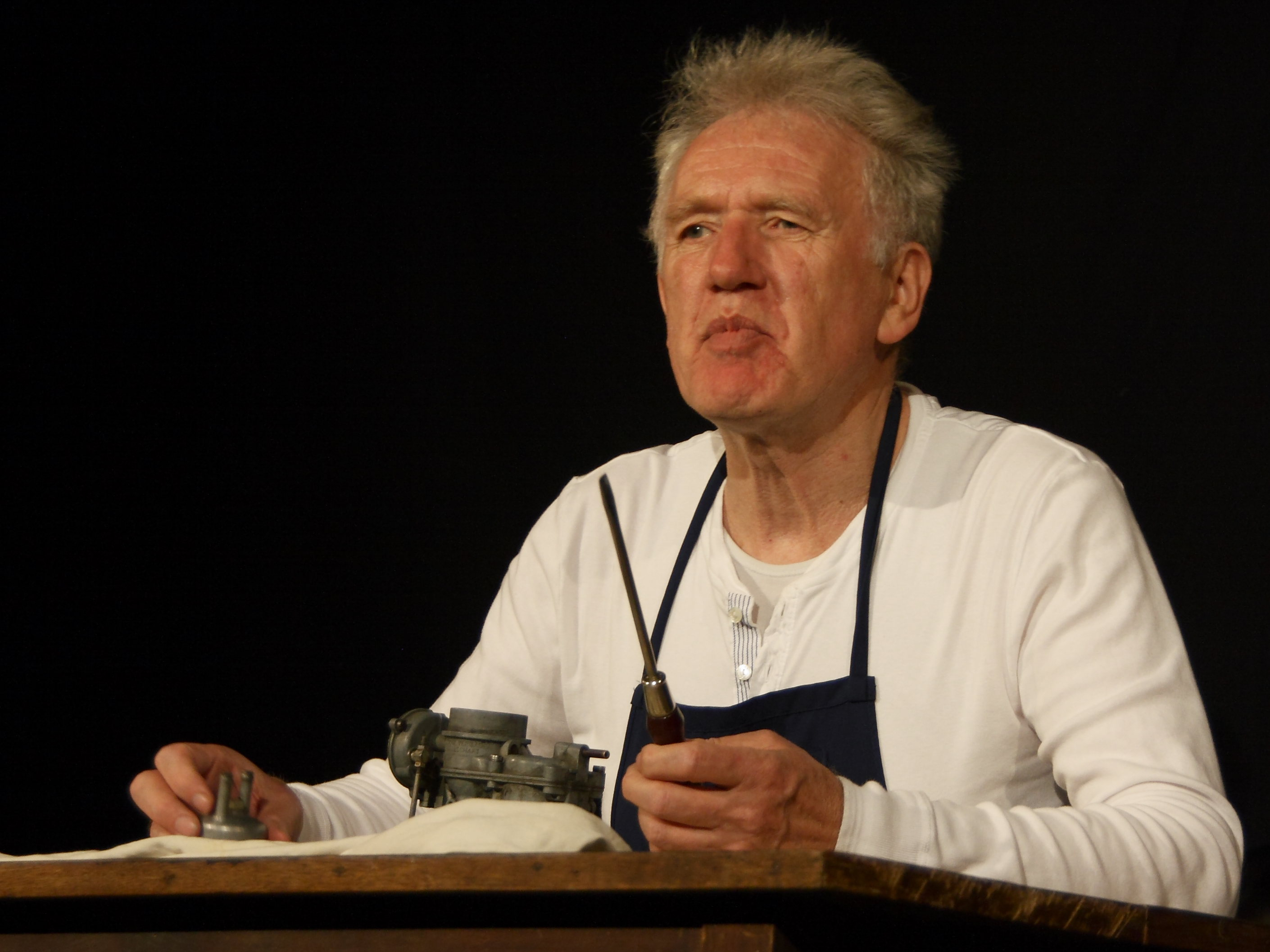 Die Schwabenoffensive mit ihrem Programm zum 25-jährigen Jubiläum Komm Du bloß hoim! Reloaded im Kult, Niederstetten.